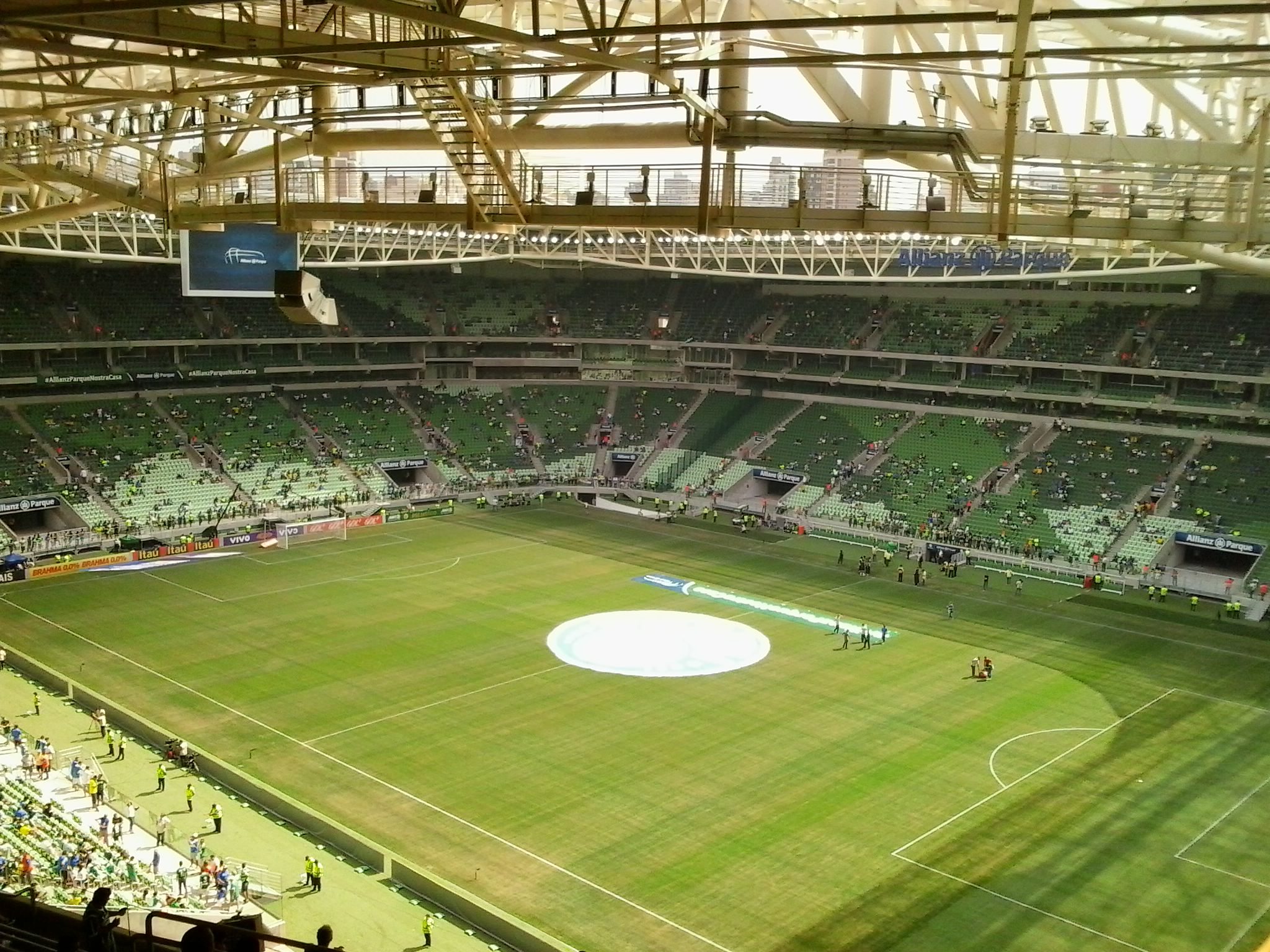 Vista da Arquibancada Superior no Allianz Parque